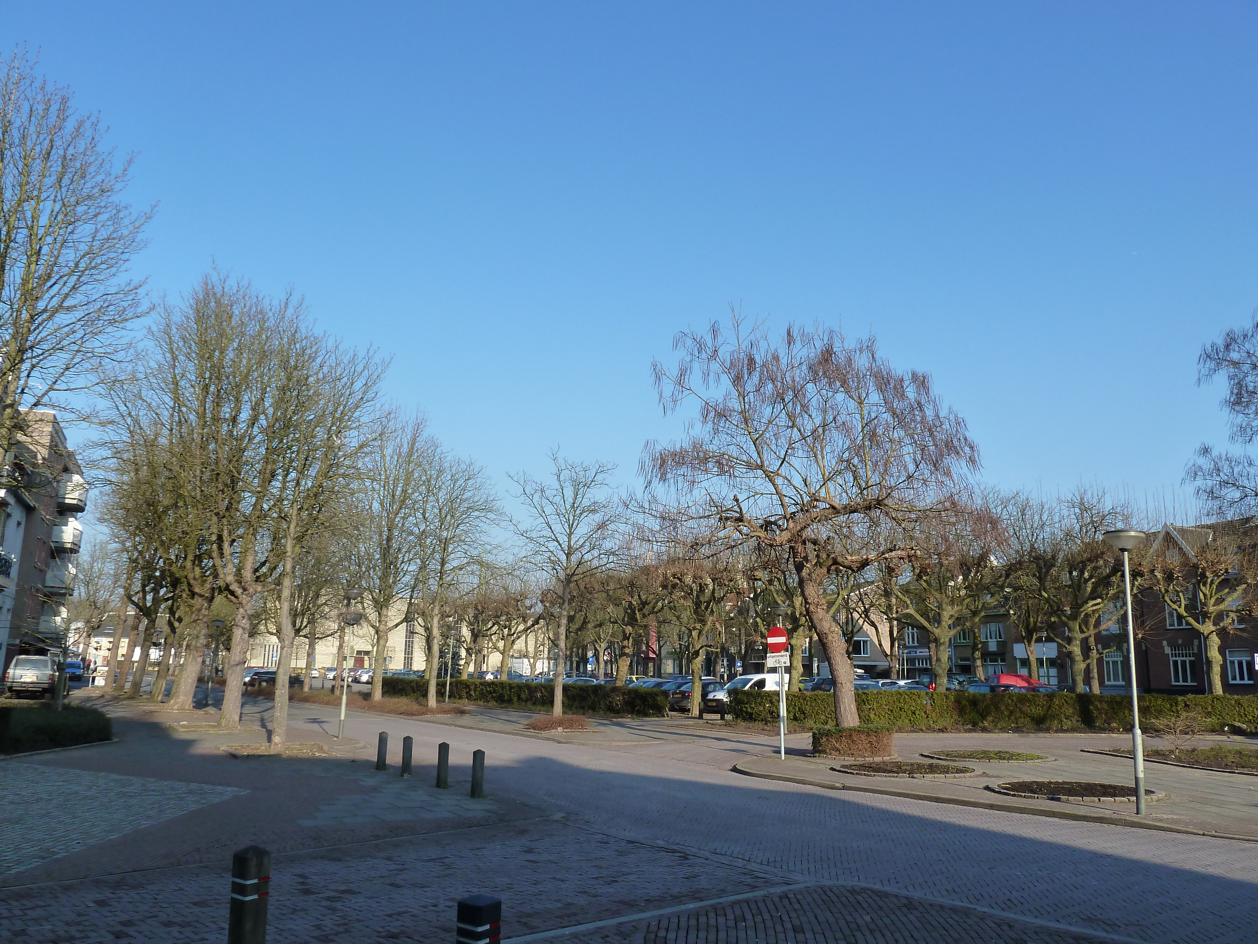 Walramplein in Valkenburg, Limburg, Nederland